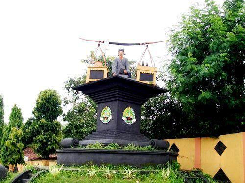 Taman Patung Sate Desa Gagaan Kecamatan Kunduran